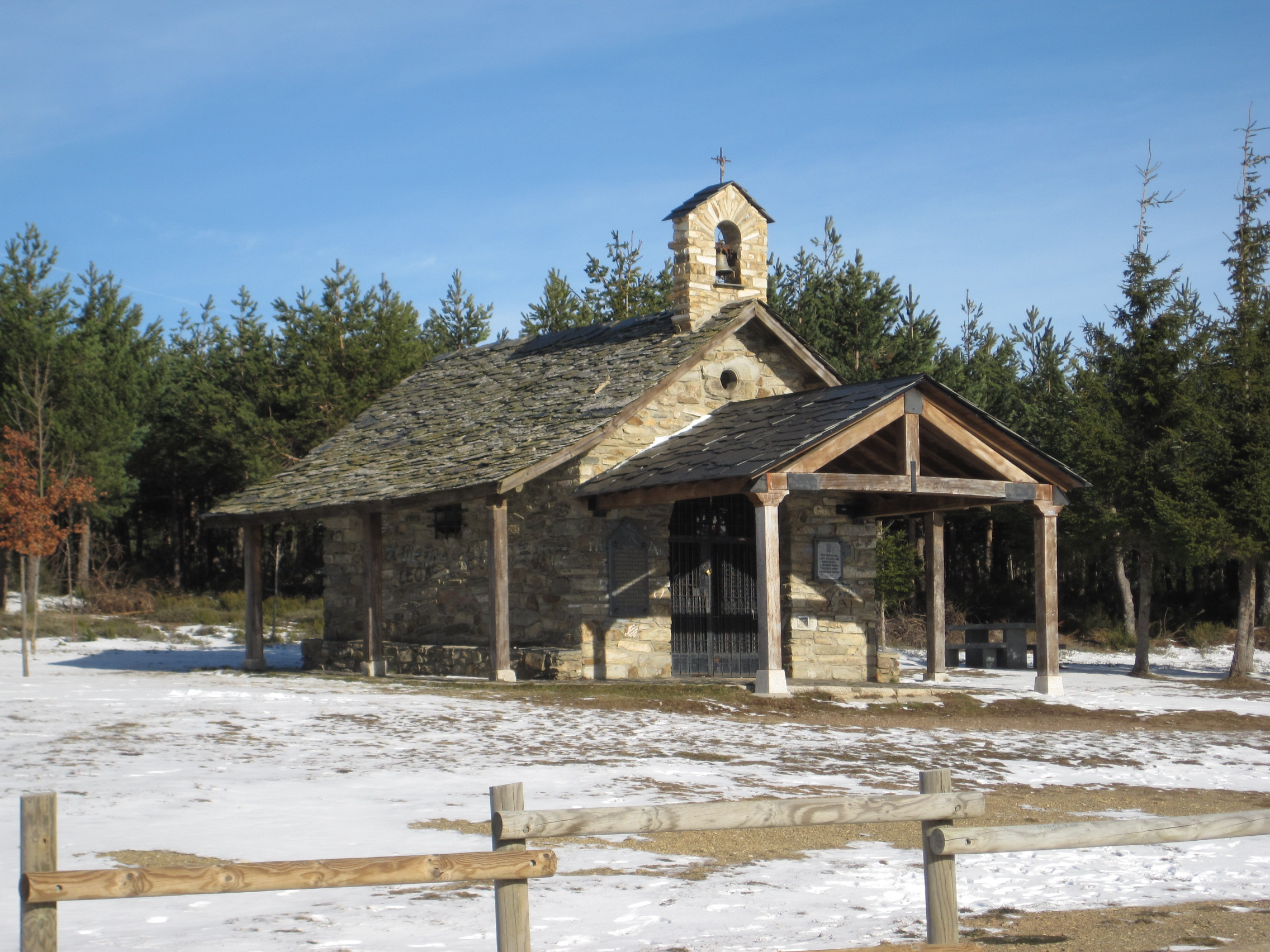 Vista de la ermita de Santiago, junto a la Cruz de Ferro, en Foncebadón (León, España).